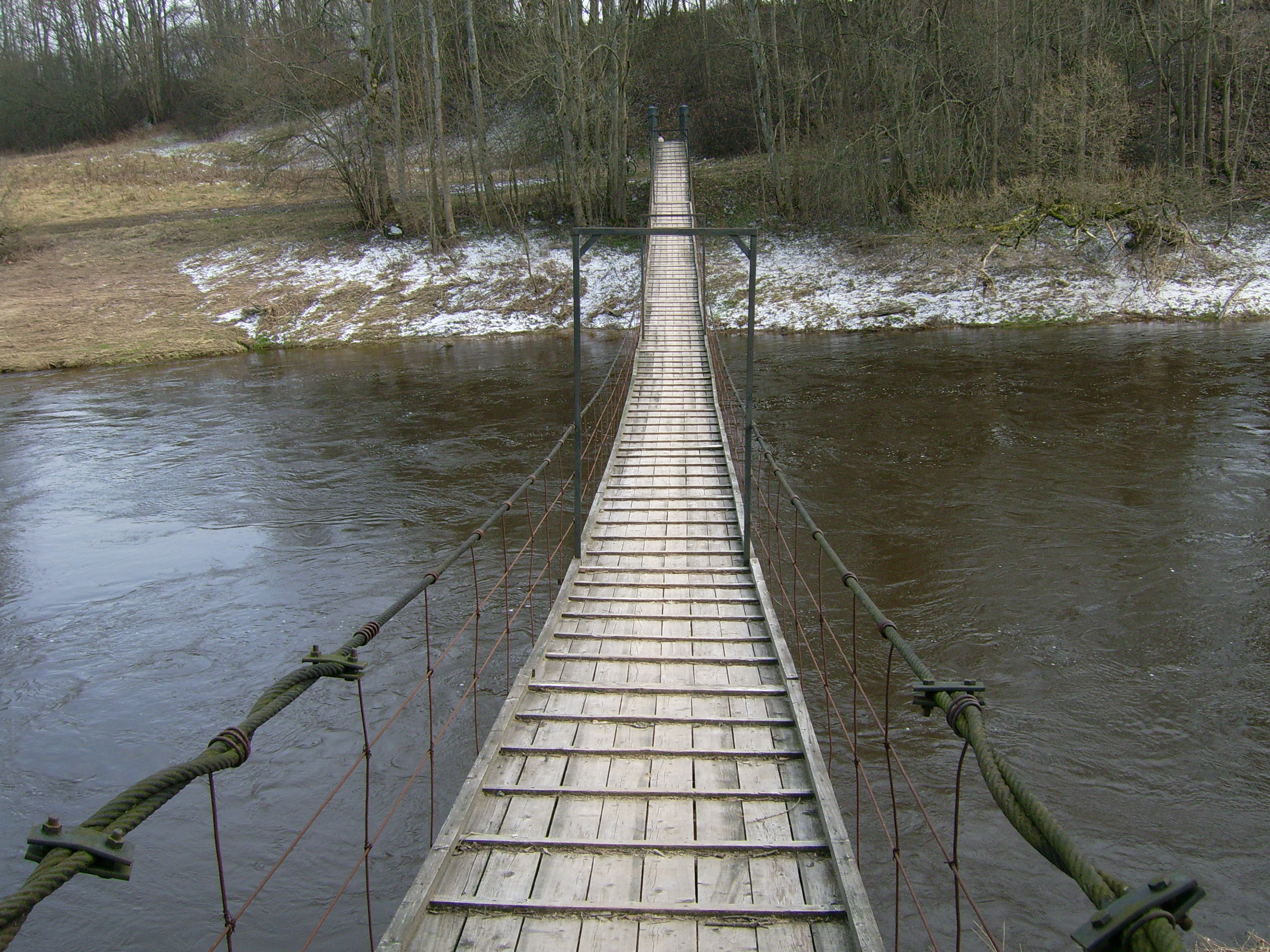 Gudlaukio pėsčiųjų tiltas per Jūrą